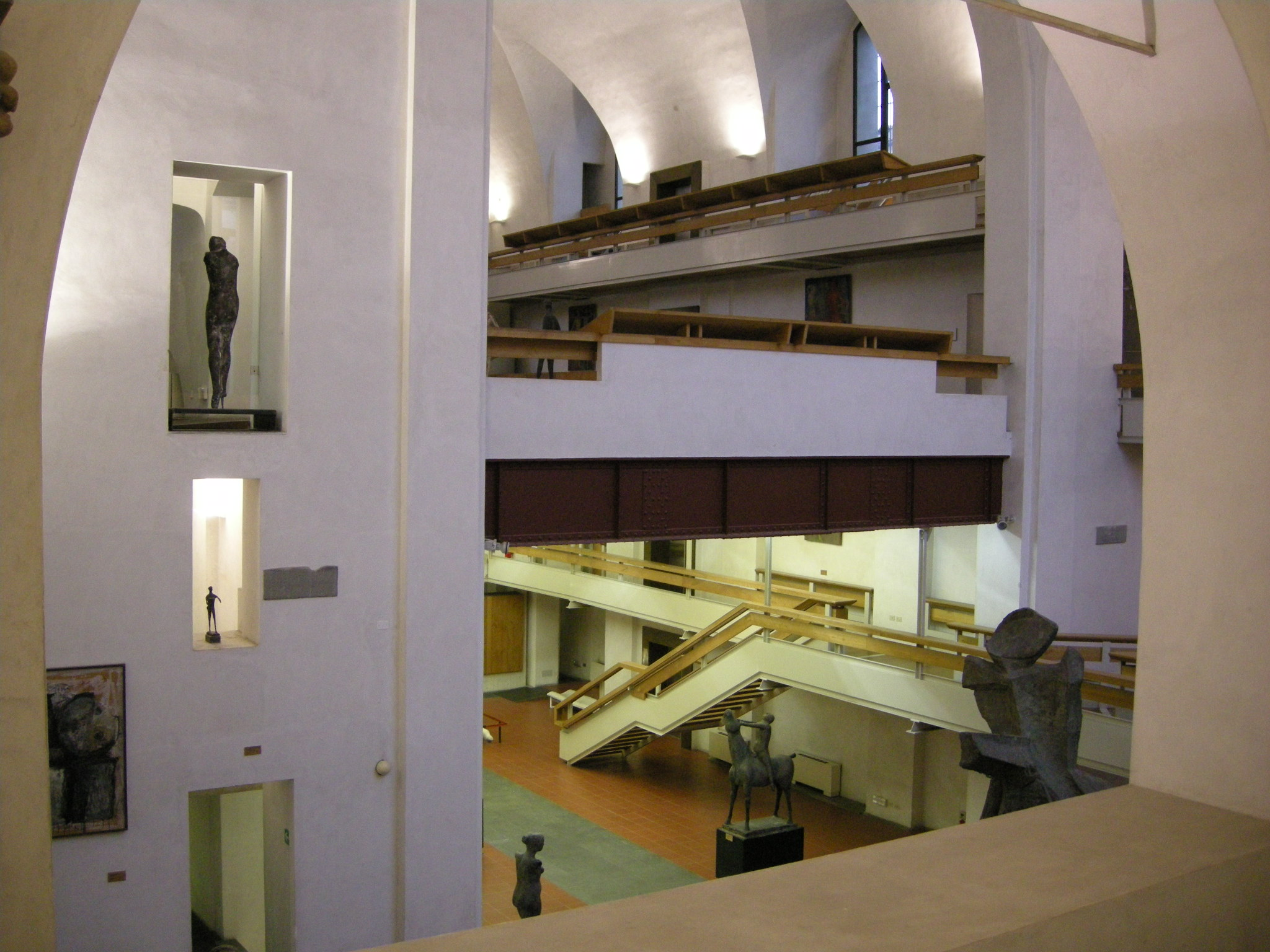 Ex-chiesa di san pancrazio